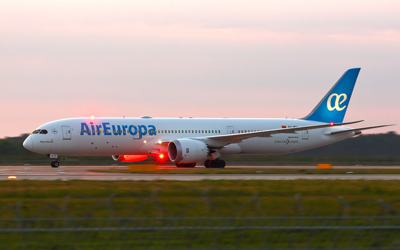 Boeing 787-9 Dreamliner в аэропорту Краснодара (фото Дмитрий Аксёнов)